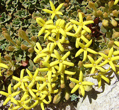 Oreopolo is a mat plant from the high Andes. Rubiaceae family. In context at Licensing